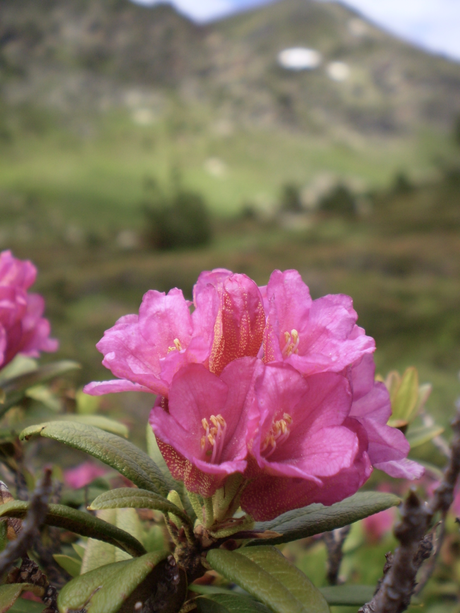 Parc naturel des vallées du Coma Pedrosa